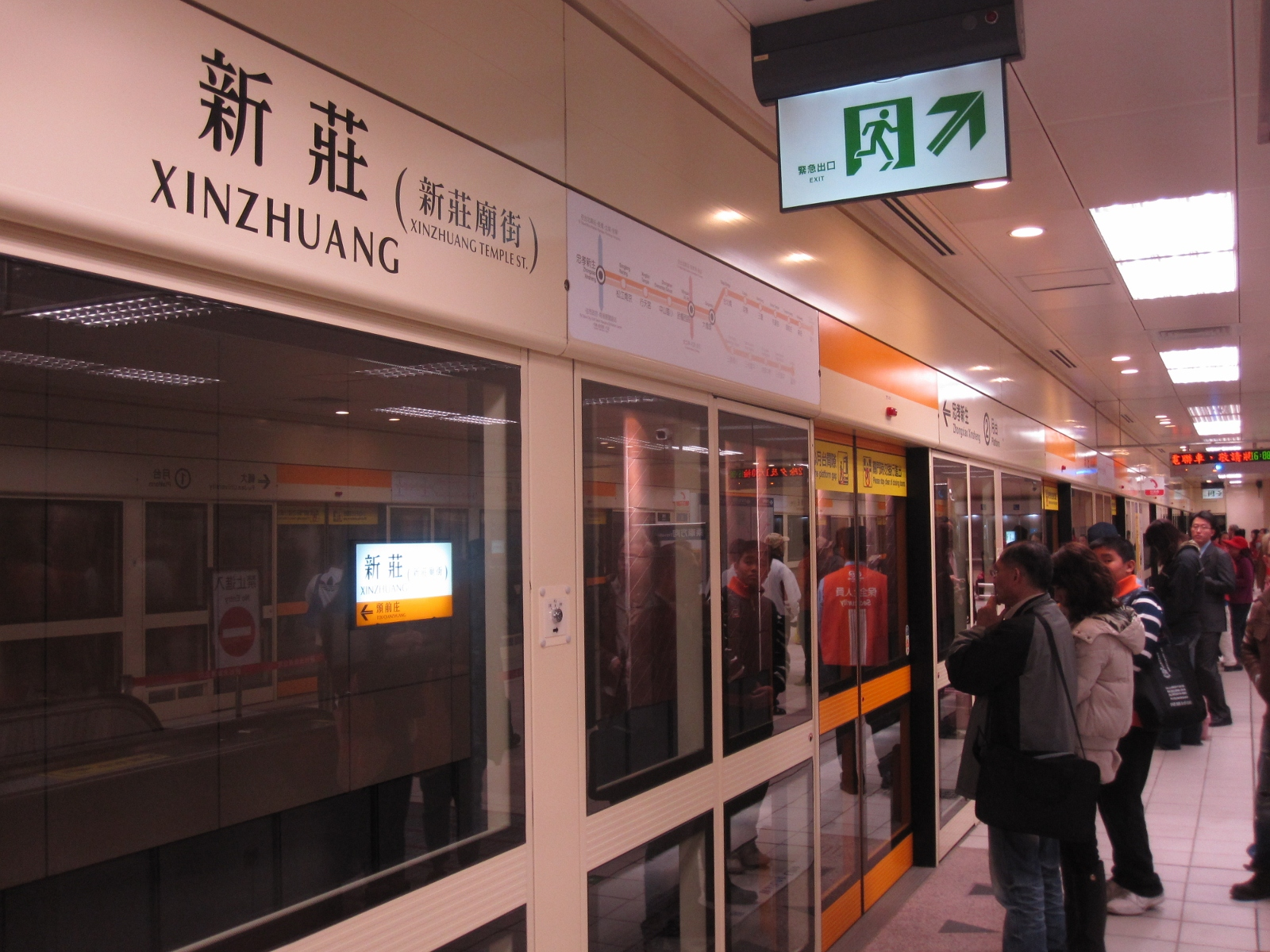 新莊站月台2